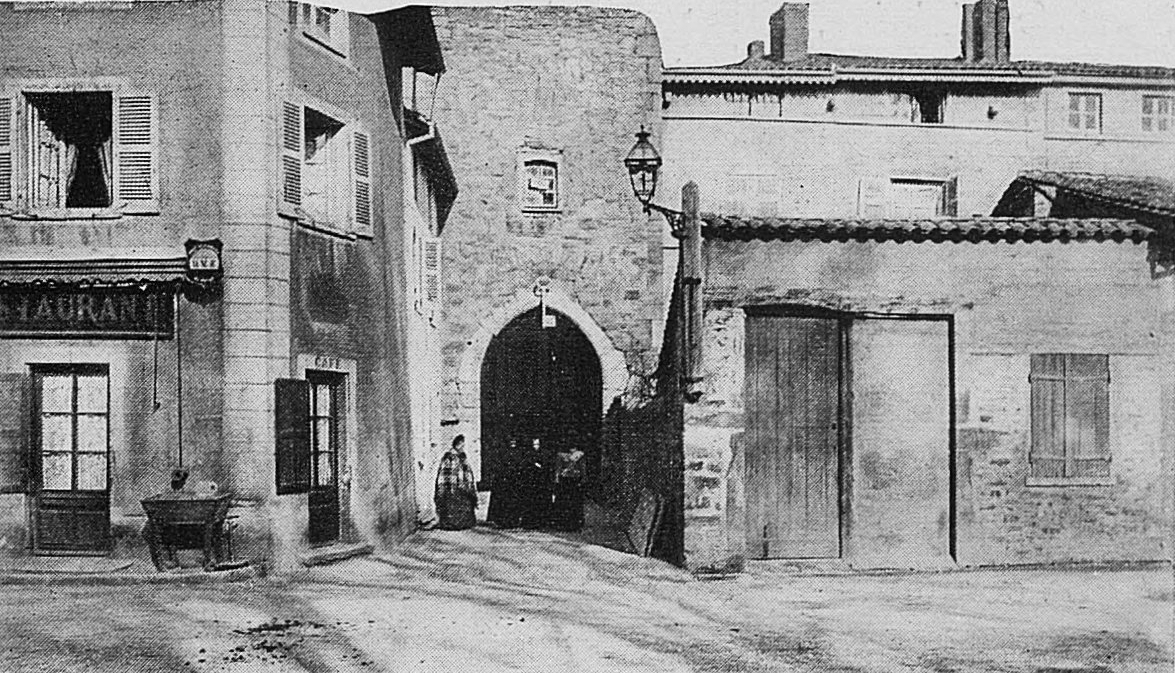 Dictionnaire illustré des communes du département du Rhône. Tome 1 / par MM. E. de Rolland et D. Clouzet.